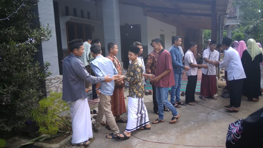 Sonjo bisa dilakukan dimana saja, kapan saja, dan oleh siapa saja. Salah satunya adalah acara silaturahmi di Desa Pakel, Kabupaten Trenggalek, Jawa Timur ini.